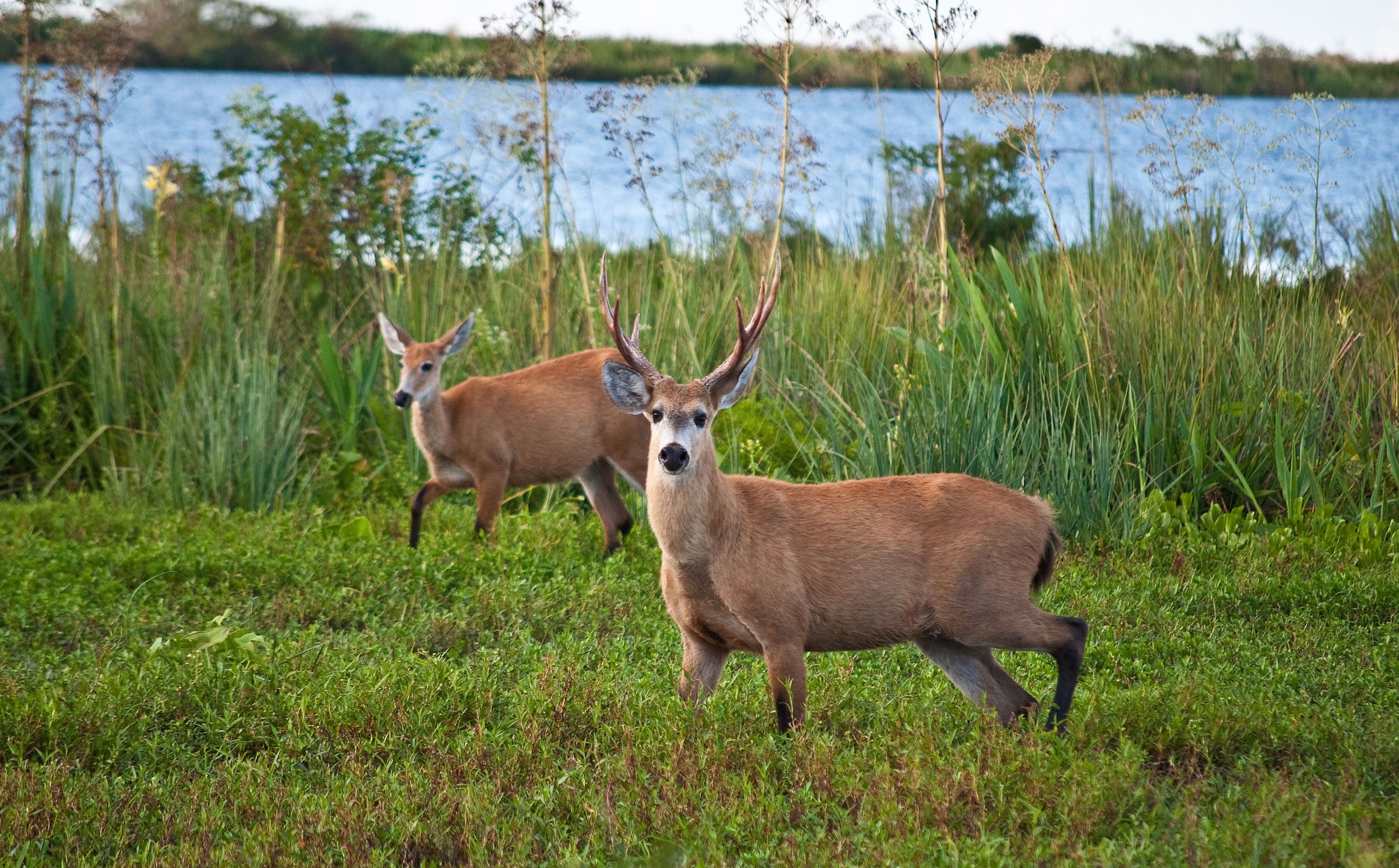 Marsh Deer, Esteros Del Ibera, Corrientes, Argentina, 3rd. Jan. 2011